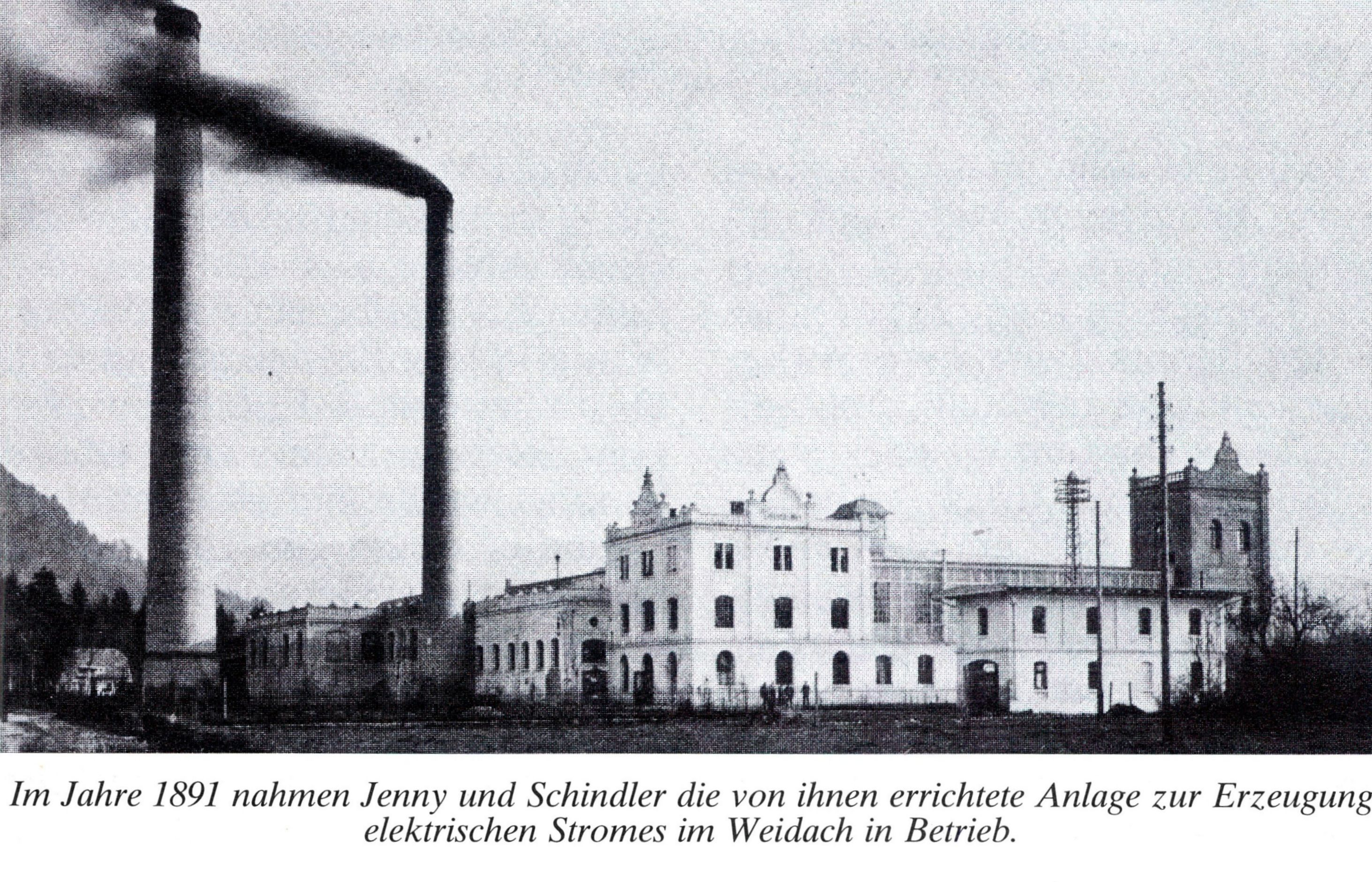 1916 Kraftwerk Rieden der VKW bei "forciertem Dampfbetrieb". Friedrich Wilhelm Schindler geboren am 1. Juni 1856 in Mollis, Schweiz; gestorben am 19. November 1920 in Kennelbach, Österreich) war ein österreichischer Unternehmer und Erfinder. Außerdem war er der Neffe von Dietrich Schindler. Er trug einen bedeutenden Teil zum Aufbau des Vorarlberger Stromnetzes bei und war treibende Kraft bei den Jenny & Schindler Elektrowerken, die 1916 in die Vorarlberger Kraftwerke umgewandelt wurden.